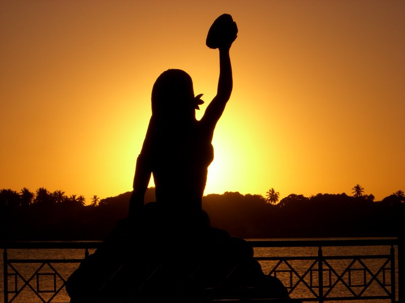 ESTÁTUA DE IRACEMA - NA LAGOA DE MESSEJANA, EM FORTALEZA (CE) - AO CREPÚSCULO VESPERTINO